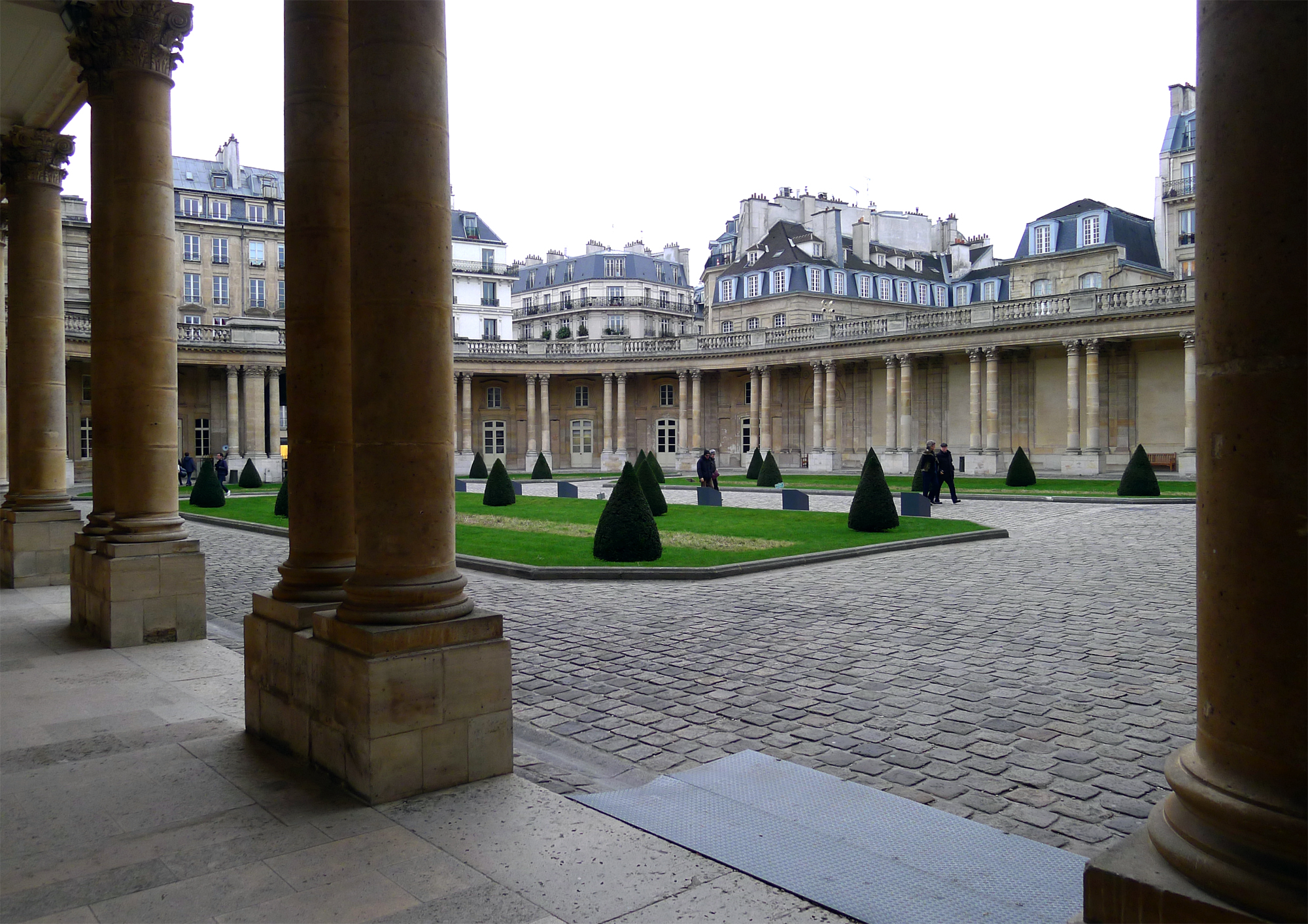 Hôtel de Soubise (cour et péristyle) - Paris III